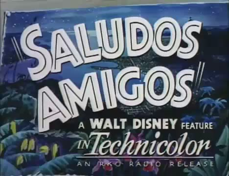 Imatges del tràiler de la pel·lícula "Saludos Amigos". Els tràilers de les pel·lícules publicats abans de 1964 als Estats Units es troben en domini públic